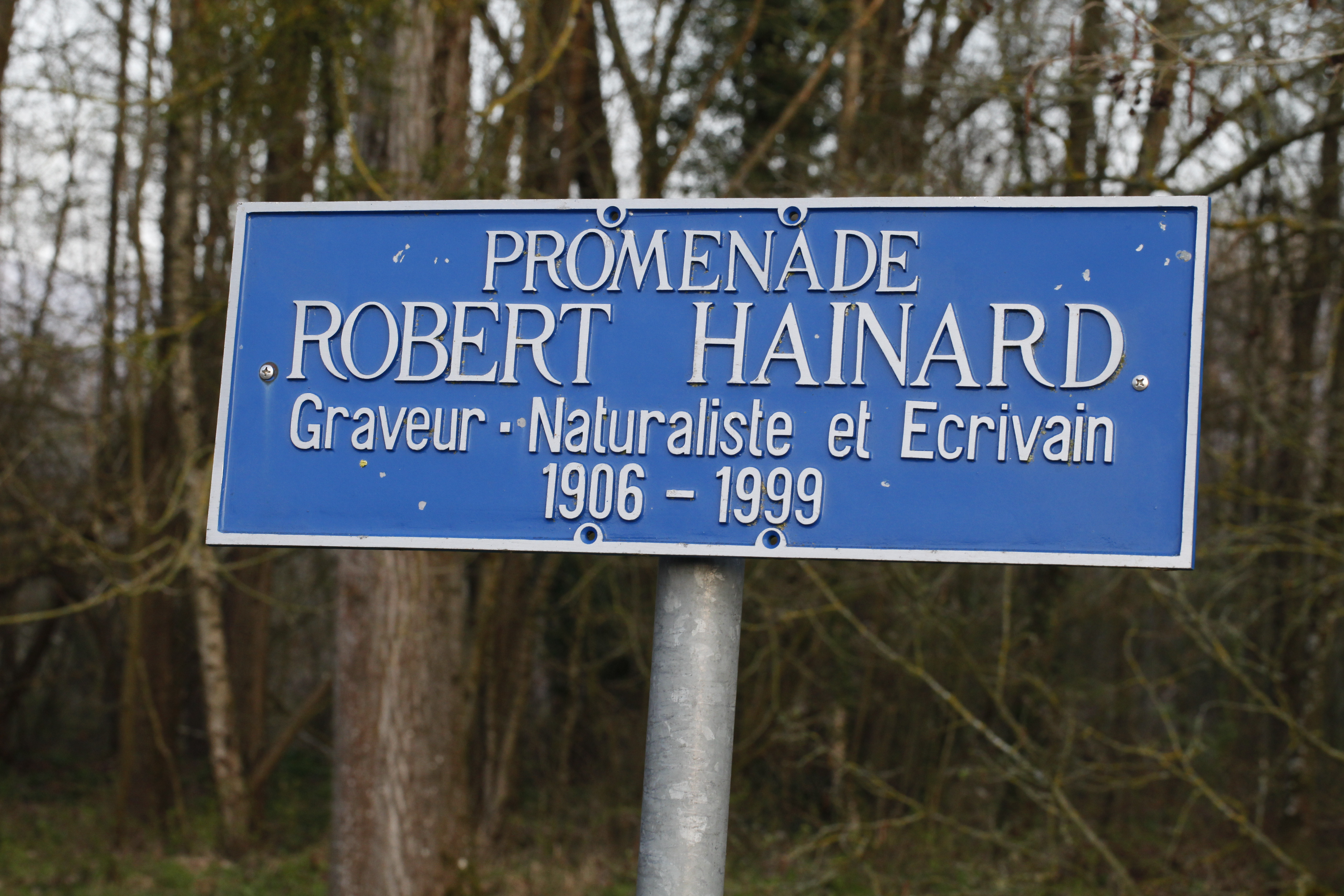 Panneau de la promenade Robert Hainard à Yverdon-les-Bains.